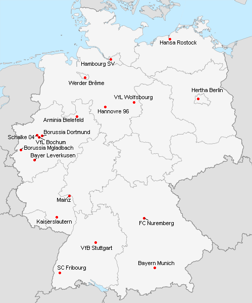 Répartition des clubs en 1.Bundesliga 2004-2005.